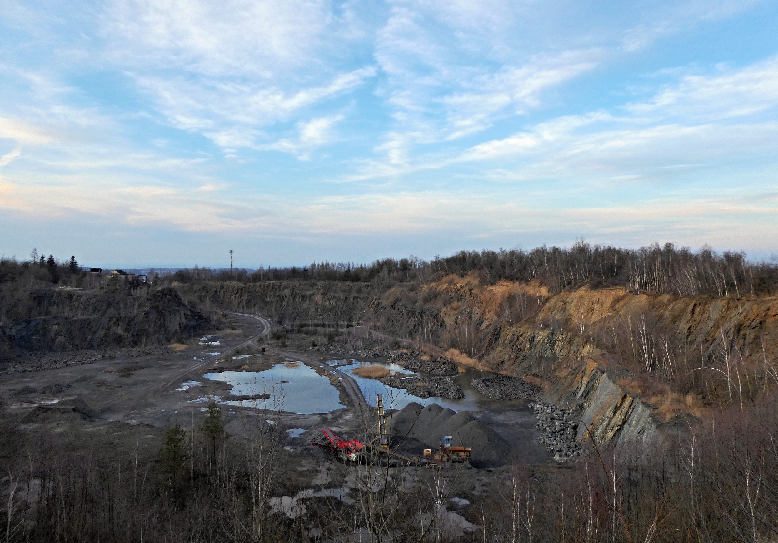 Kamenolom Humperky ve Skutči s mobilním drtičem kamene na dně lomové jámy, která vznikla odtěžením horniny. V minulosti zde byla tzv. rohovcová vyvýšenina Humperky s vrcholem 469 m n.m. (Josef Doležálek : Skuteč, vlastivědný průvodce Skutčí a okolím, vydal Měst.NV a Muzejní rada ve Skutči v roce 1967). Ve 2. polovině 20. století probíhala v lomu Humperky intenzivní těžba rohovce, který se odstřeloval ze skalních stěn a v objemných kusech dopravoval vozidly typu Dumper ke stabilnímu drtiči kamene, který stával na nynějším skalním ostrohu (v záběru vlevo). Drcený kámen se od drtiče dopravoval pomocí dopravníkových pásů k dalšímu zpracování do objektu kamenolomu sousedícího se železniční stanicí Skuteč (dříve Skuteč město), dnes na železniční trati 261, se kterou byl kamenolom spojen železniční vlečkou. Dnes jsou v lomu patrny pouze zbytky demontovaných technologií bývalého kamenoprůmyslu. Zeměpisná mapa : viz